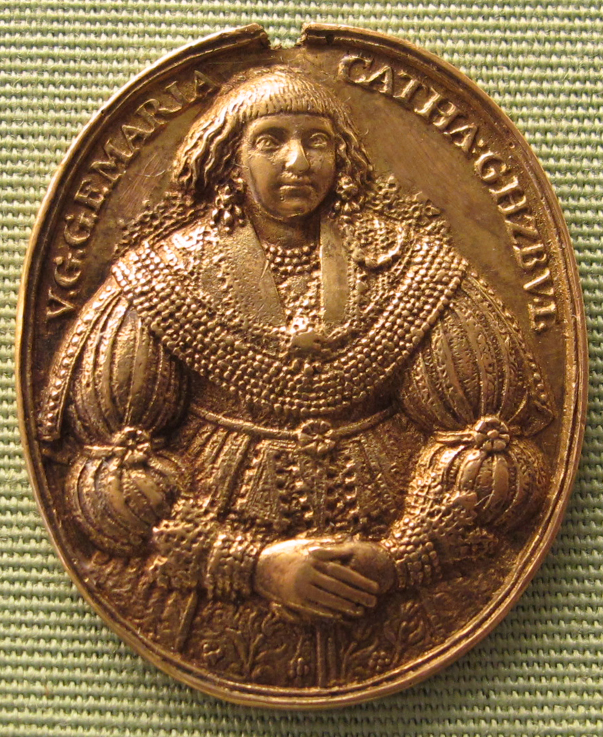 Maria Caterina duchessa di Mecklenburgo-Schwerin (1616-1665), 1635